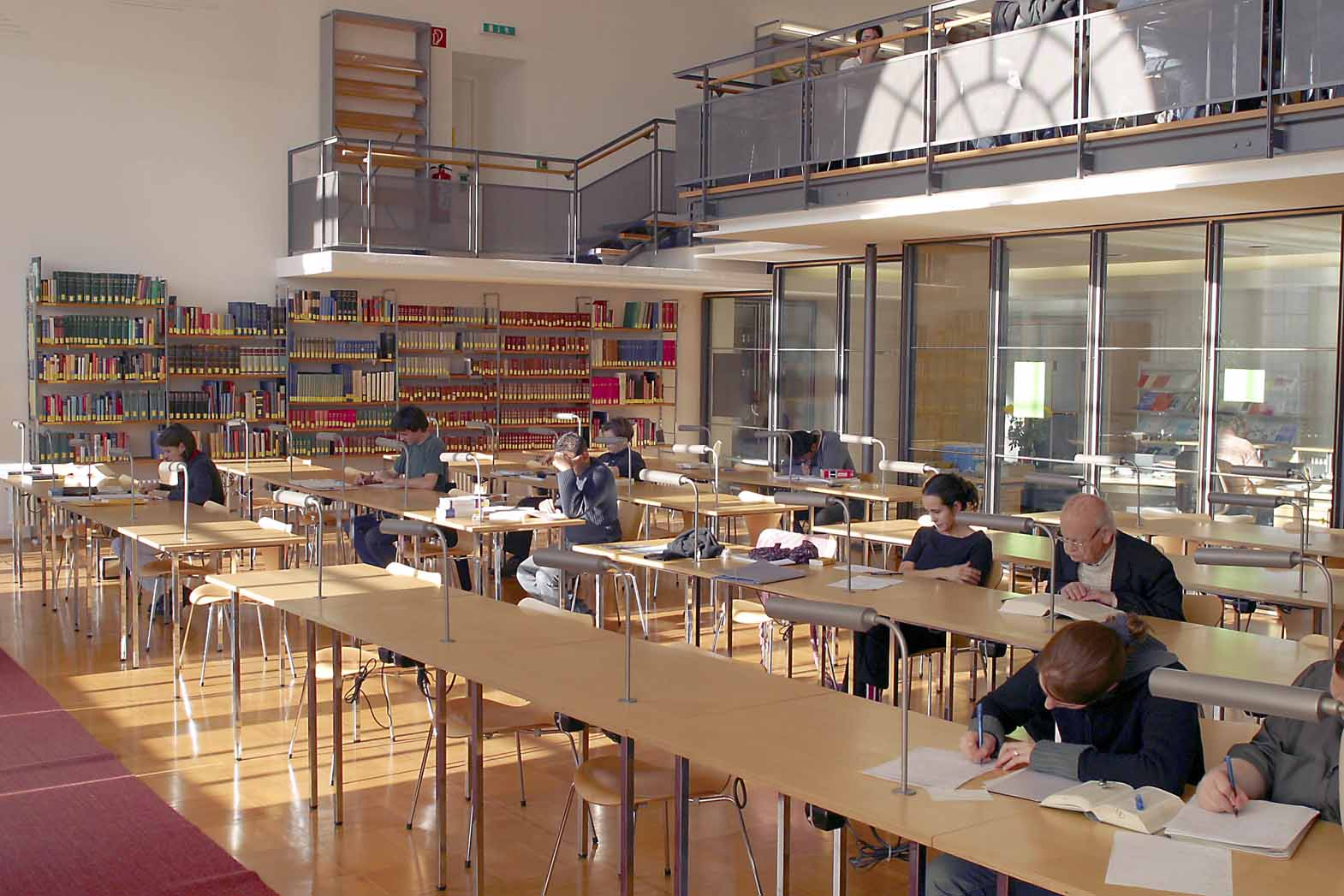 Universitaets- und Landesbibliothek Darmstadt, Lesesaal